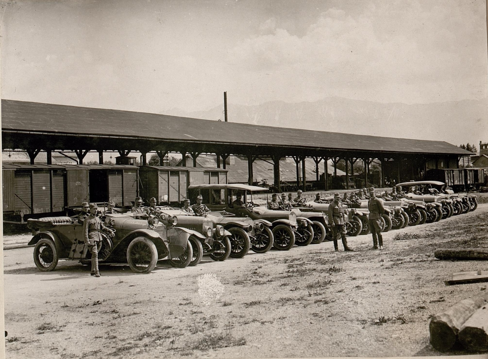 Kraftfahrzeugkolonne des 10.Armee-Komdos.